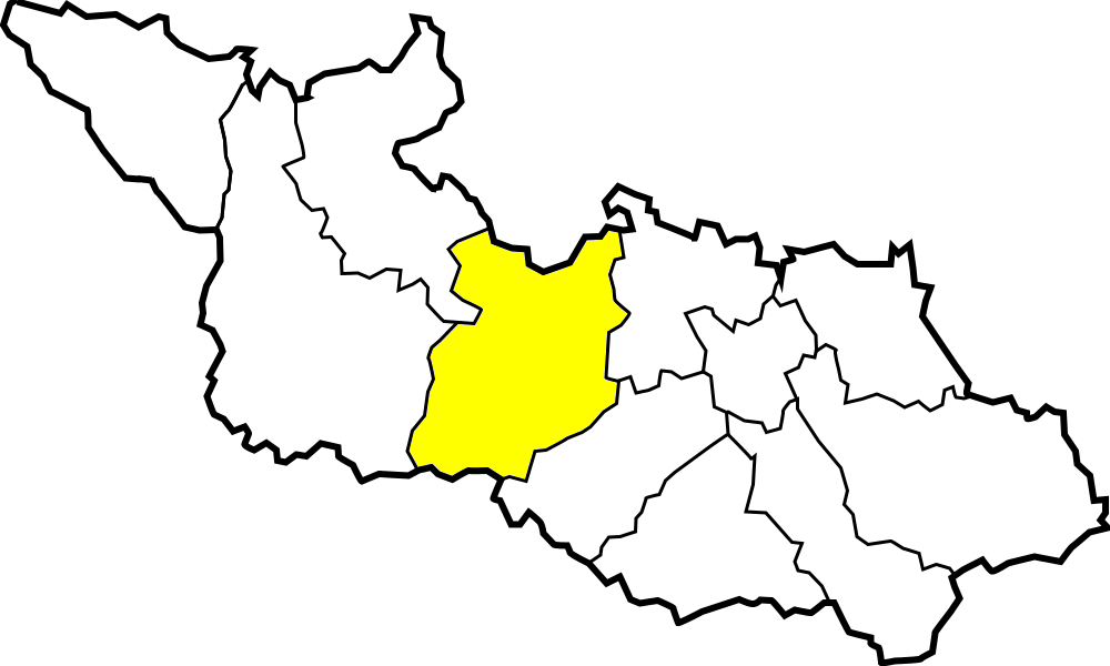 Diecezja ostrawsko-opawska - dekanat Opawa